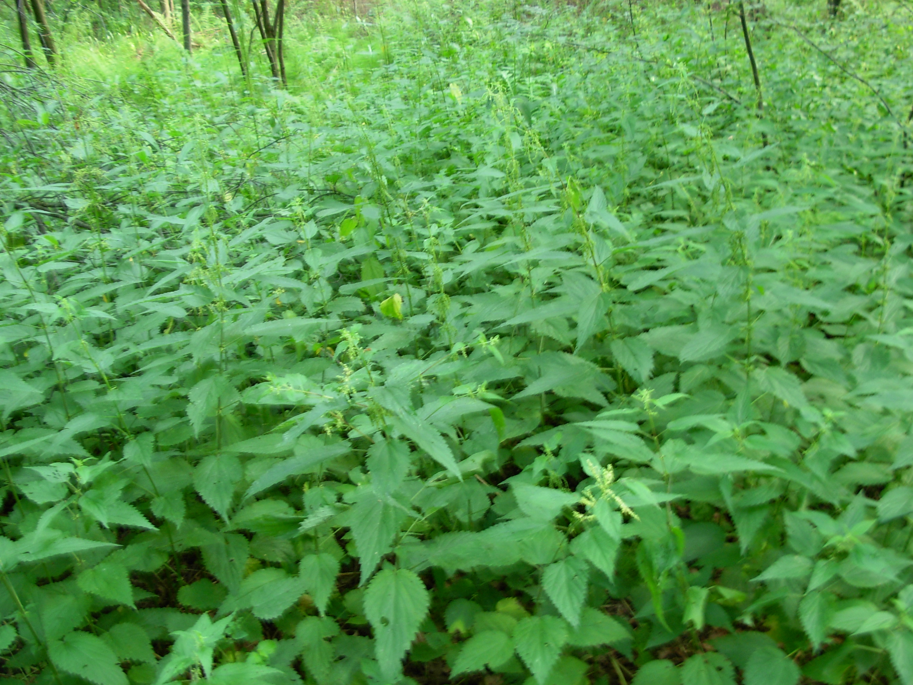 Pokrzywa zwyczajna Utrica dioica.